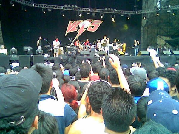 Vive latino 2005, en el turno de Vicentico